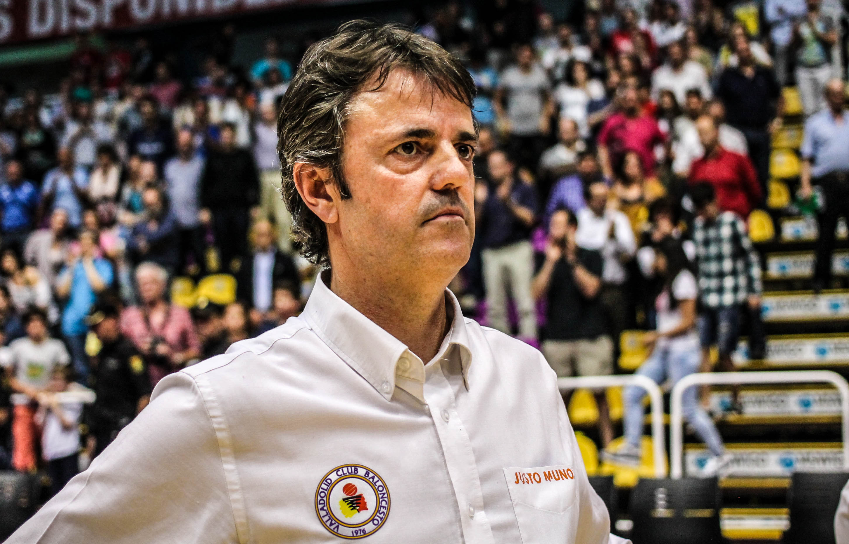 Partido entre C.B.Valladolid y C.B.Breogán en el polideportivo Pisuerga en Valladolid.